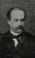 Político católico